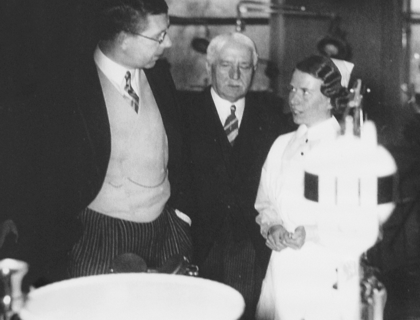 Eastmaninstitutet invigs den 25 april 1936 av dåvarande kronprinsen med bl.a. Dr. Burkhardt från USA